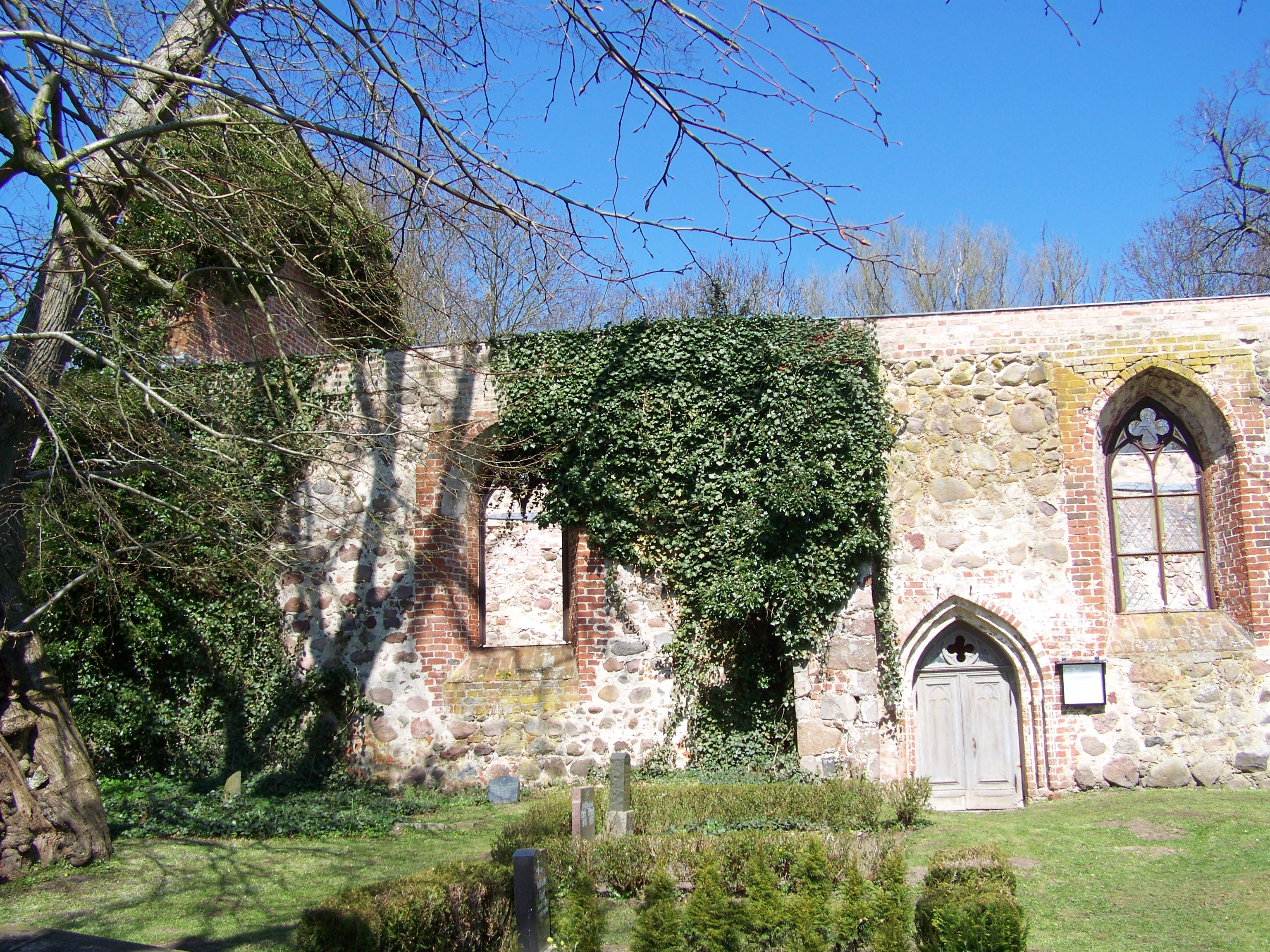 Roloffshagen, Kirchenruine - Schiff (2008-04-20)